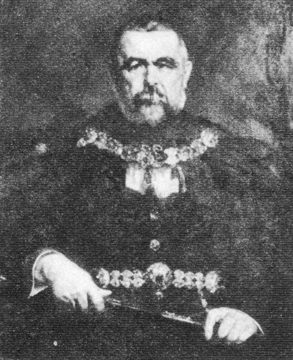 György Endre. Karlovszky Bertalan festménye.